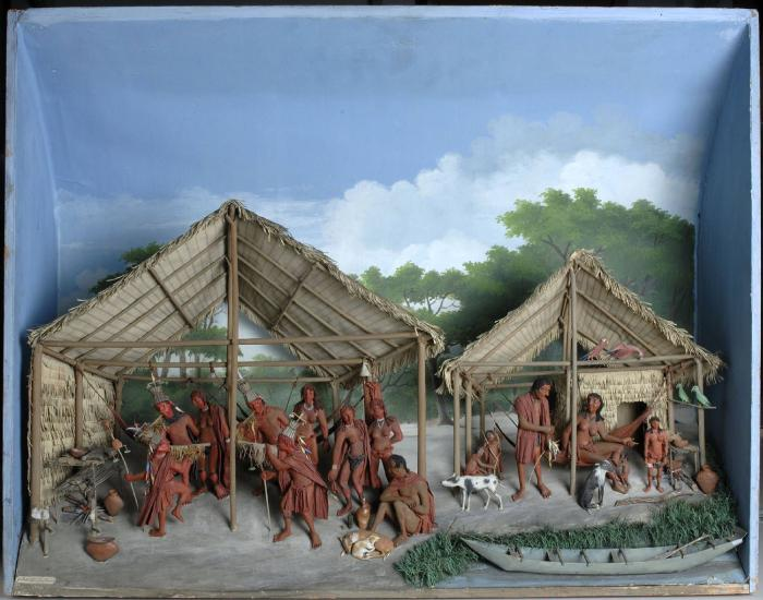 Diorama. In de hut links dansende Indianen, twee op de voorgrond, fraai uitgedost en dans uitvoerend, terwijl anderen in een rij erachter. Rechts op de voorgrond een zittende figuur met twee honden aan de voeten. In de hut rechts een vrouw in een hangmat, een man die thuiskomt van het vissen, vier kinderen er omheen, nog wat honden en een kano. Vermoedelijk werden deze diorama's verkocht aan Europeanen (Lorm, 1943:159). Gerrit Schouten (1779-1839) was de eerste Surinaamse kunstenaar die erkenning kreeg. Hij was een bekwaam aquarellist van de rijke flora van Suriname maar hij werd het meest bekend als maker van kijkkastjes met een vernuftig perspectief. Deze diorama's met scènes uit de plantagekolonie maakte hij in opdracht van kolonialen die een aandenken mee terug wilden nemen naar Nederland. Gerrit Carl François Schouten werd in 1779 geboren als oudste zoon van de Nederlander Hendrik Schouten en de kleurlinge Suzanna Johanna Hanssen. Hij staat bekend als de maker van diorama's, een soort kijkkasten met perspectivische voorstellingen. De thema's zijn Indianenkampen, slavendansen, stadsgezichten en plantages. Schouten maakte de diorama's van 1810-1834; de meeste van de 24 die bekend zijn, zijn verspreid over nederlandse musea. Een aantal is particulier bezit, en één bevindt zich weer in Suriname. De vrij prijzige kasten werden gemaakt als souvenir voor Europeanen (Medendorp, 1997:23).. Diorama van een indiaans tafereel